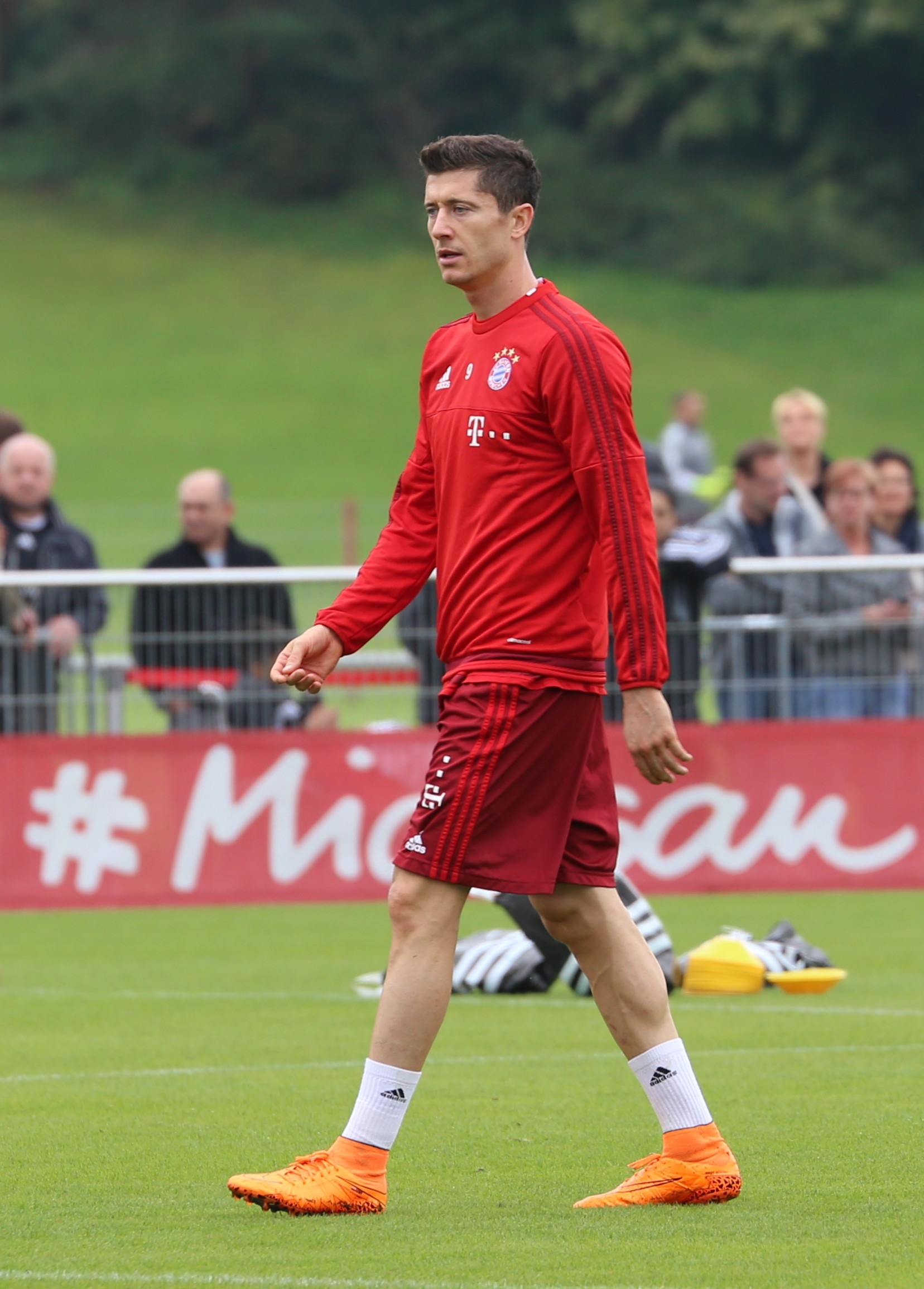 Robert Lewandowski beim Training auf dem Gelände des FC Bayern München